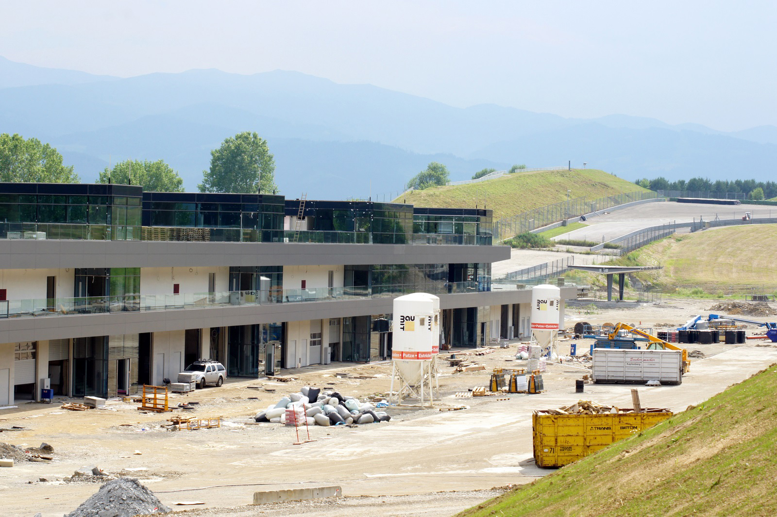 Österreichring/Red-Bull-Ring: Baufortschritt Neues Fahrerlager und Boxenanlage 4. Juli 2010